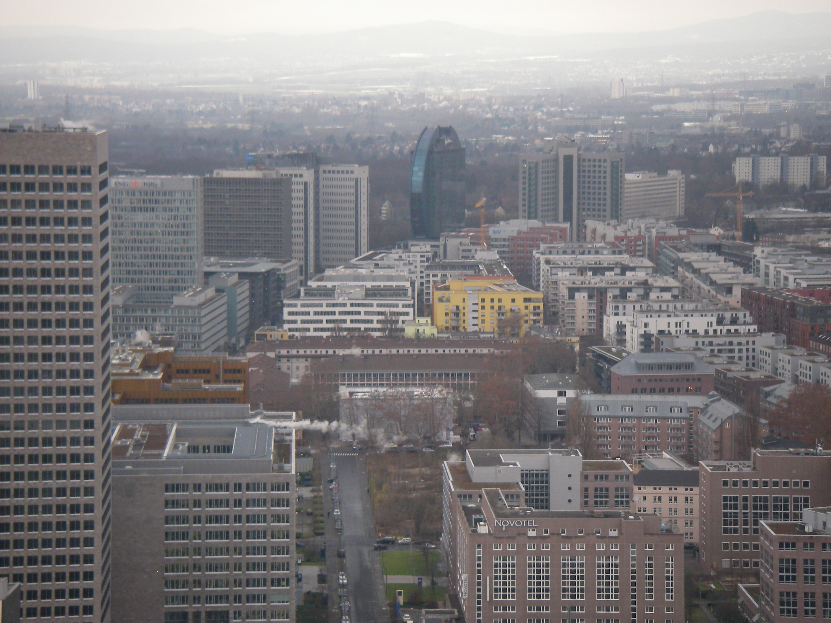 City-West in Frankfurt aus dem Marriott Hotel gesehen. Blick auf IBC, Ing-DiBa, Amex, Novotel Frankfurt Messe, Mercure Hotel Voltastraße, Radisson-Hotel und Scala. Bildmitte Lise Meitner Straße (1878-1968), Kernphysikerin